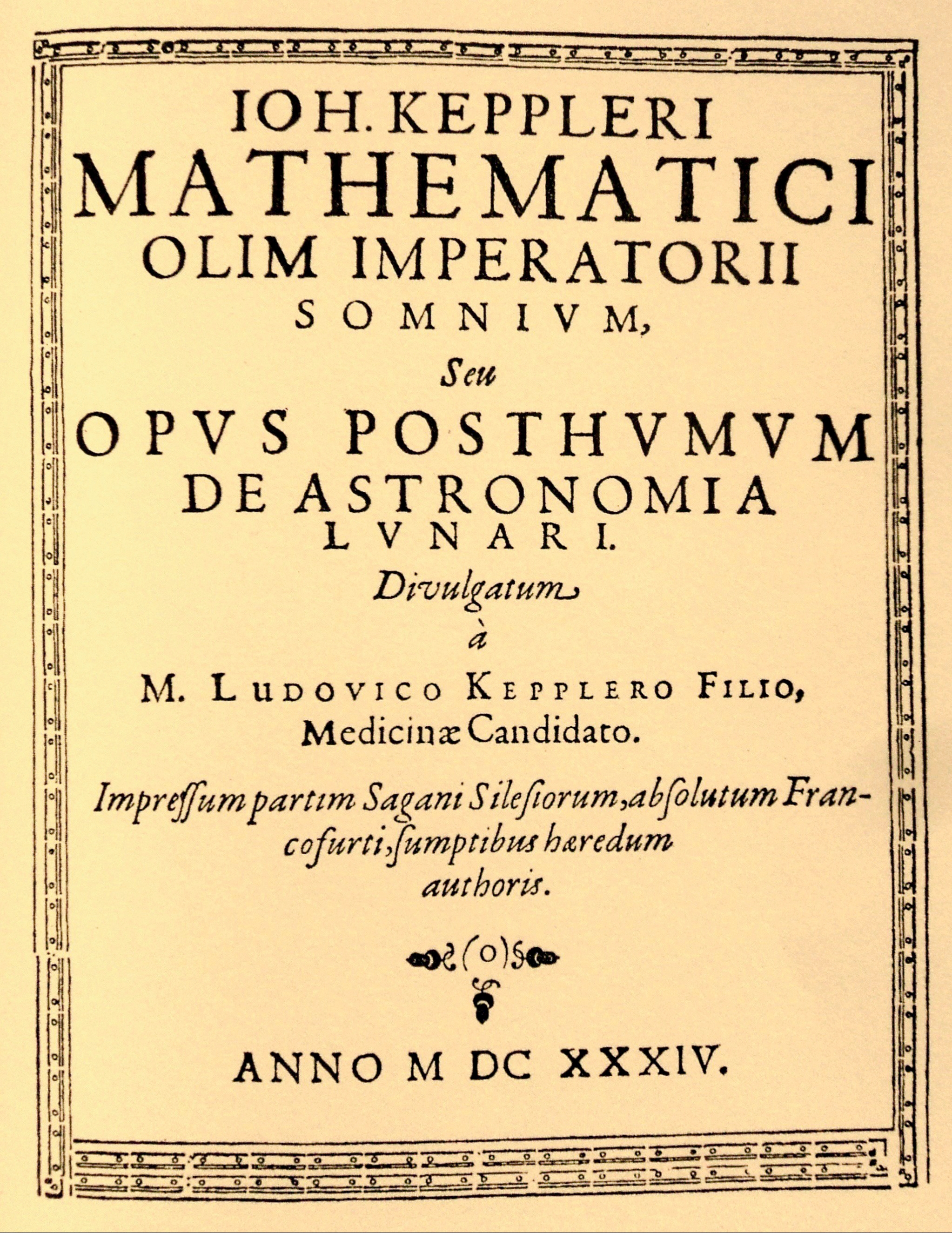 Portada del cuento "El Sueño o la Astronomía de la Luna" de Johannes Kepler. Johannes Kepler (1571-1630), astrónomo alemán, escribió un cuento llamado “El Sueño o la Astronomía de la Luna” (1630), considerado uno de los primeros cuentos de ciencia ficción. En el cuento, Kepler denomina a la Tierra llamada por los lunáticos “Volva”, porque gira cada 24 hs. y 52 mins. y al hemisferio lunar visible desde la Tierra lo llama “Subvolva” y al invisible “Privolva”. El personaje de la ficción se llama “Duracoto” y su madre “Fiolxhilde”, una bruja que con sus conjuros logra que “Duracoto” viaje hacia la "Isla de Levania" (Lebana: Luna en hebreo) y pueda describir la astronomía desde aquel lugar. Los viajes desde “Volva” (Tierra) hacia “Levania” (Luna) se deben efectuar en un eclipse de Luna, es decir viajar en el cono de sombra de “Volva” y los viajes de regreso a Volva (Tierra), a traves del cono de sombra de “Levania” (Luna) o sea en un eclipse de Sol. En realidad, en la vida personal de Kepler, su madre Katharina Guldenmann fue perseguida por la Inquisición por practicar brujerías y fue salvada de la hoguera por las influencias de su hijo siendo astrónomo real.